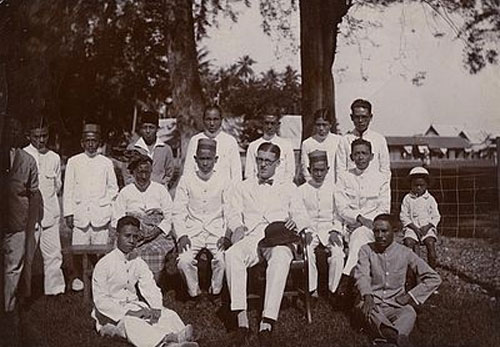 Lapangan Pemuda Benteng Tahun 1923